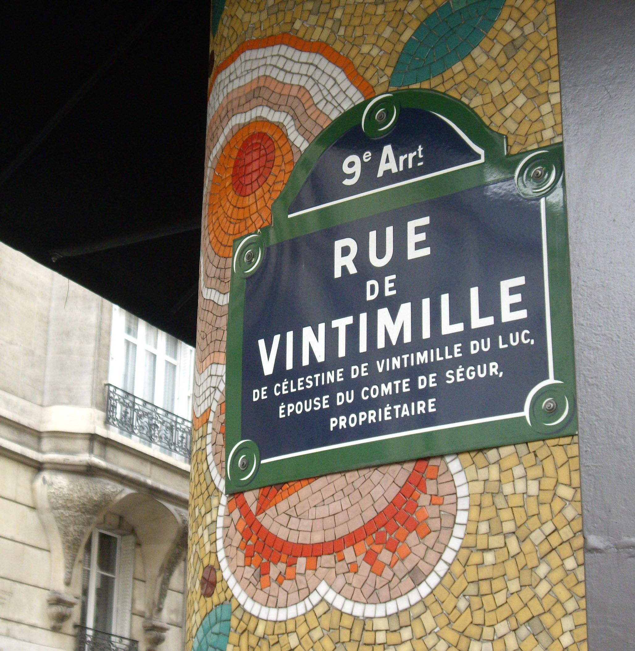 Rue Vintimille, Paris 9e. « De Célestine de Vintimille du Luc, épouse du comte de Ségur, propriétaire. »